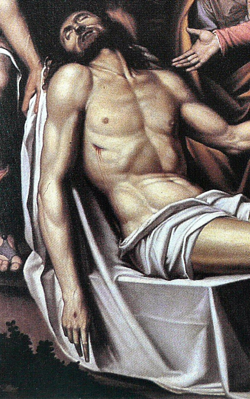 particolare della Pietà del Peterzano